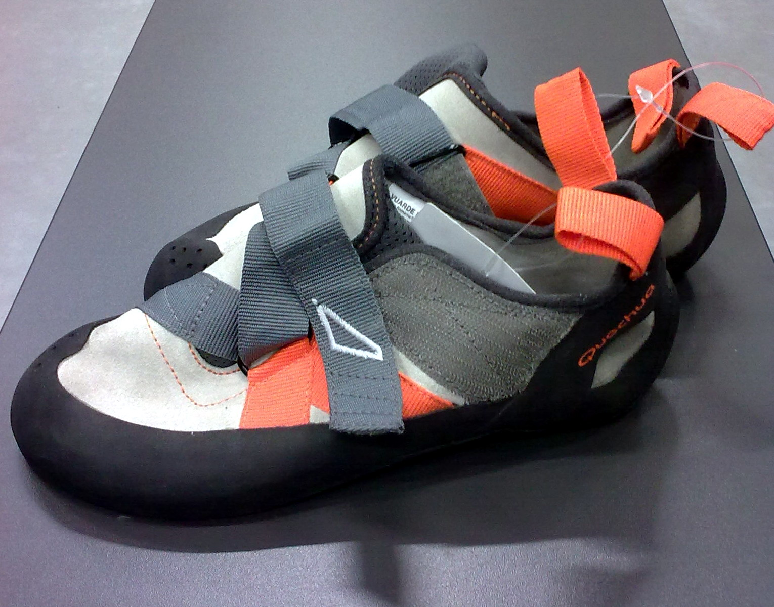 Buty do wspinaczki firmy Quechua.